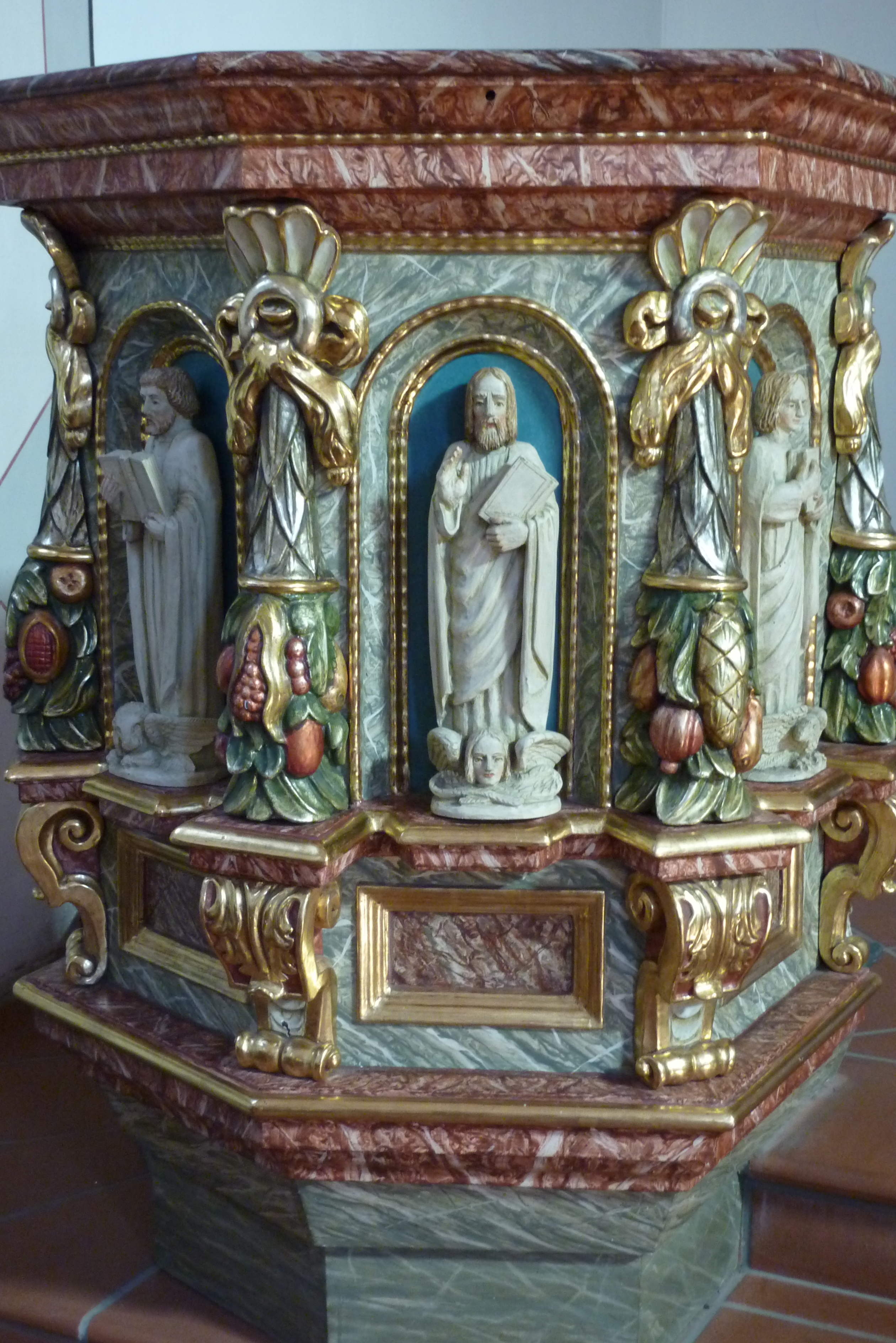 Pfarrkirche St. Luzia in Rech, Kanzel